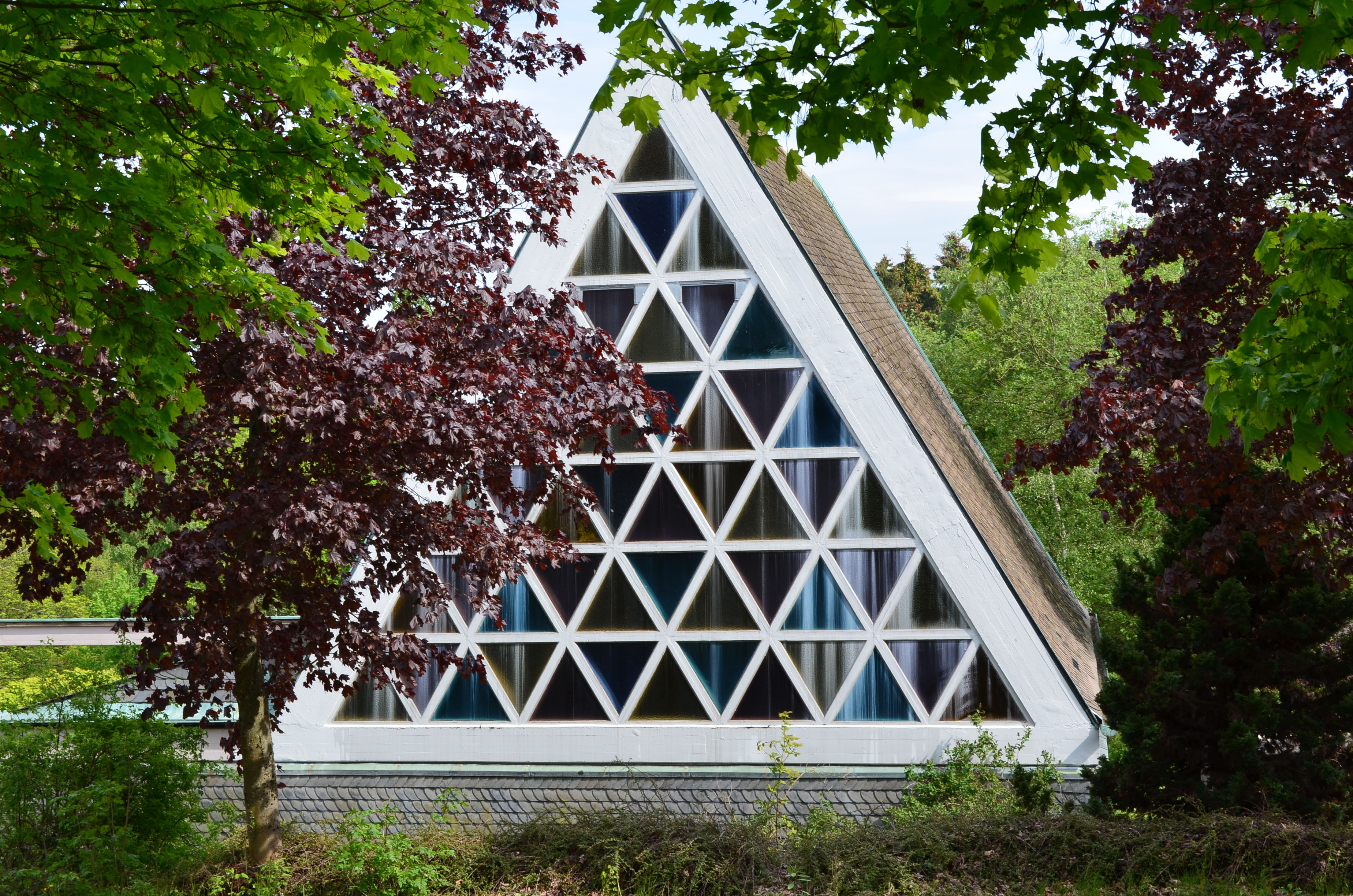 Petersborn\Gudenhagen- Petersborn evangelische Kirche Fenster Deieckswaben